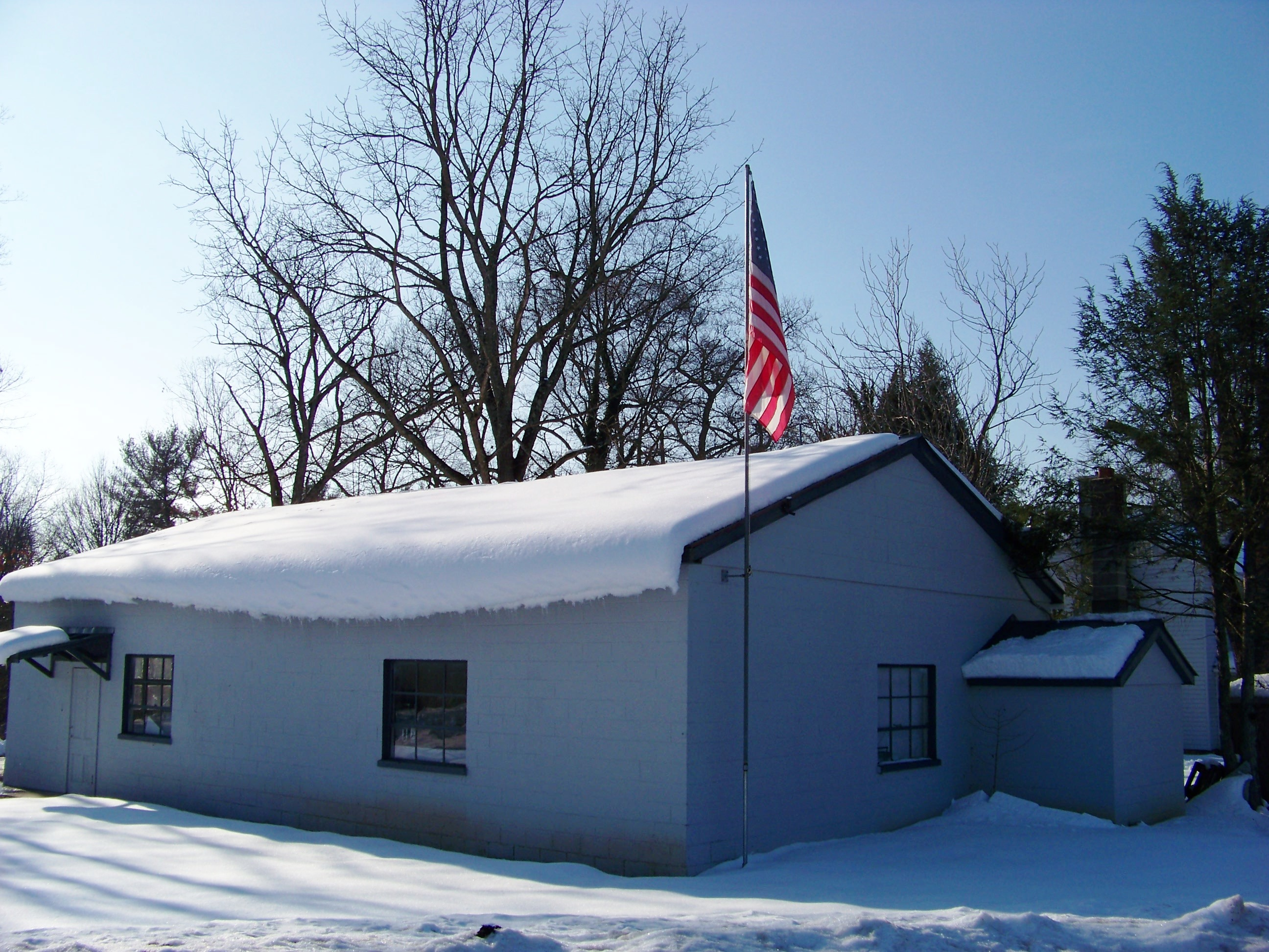 Walkers Creek, VA, USA